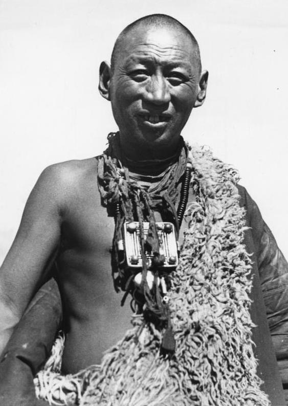 Lhasa, Ngoloklager, Ngoloktypen